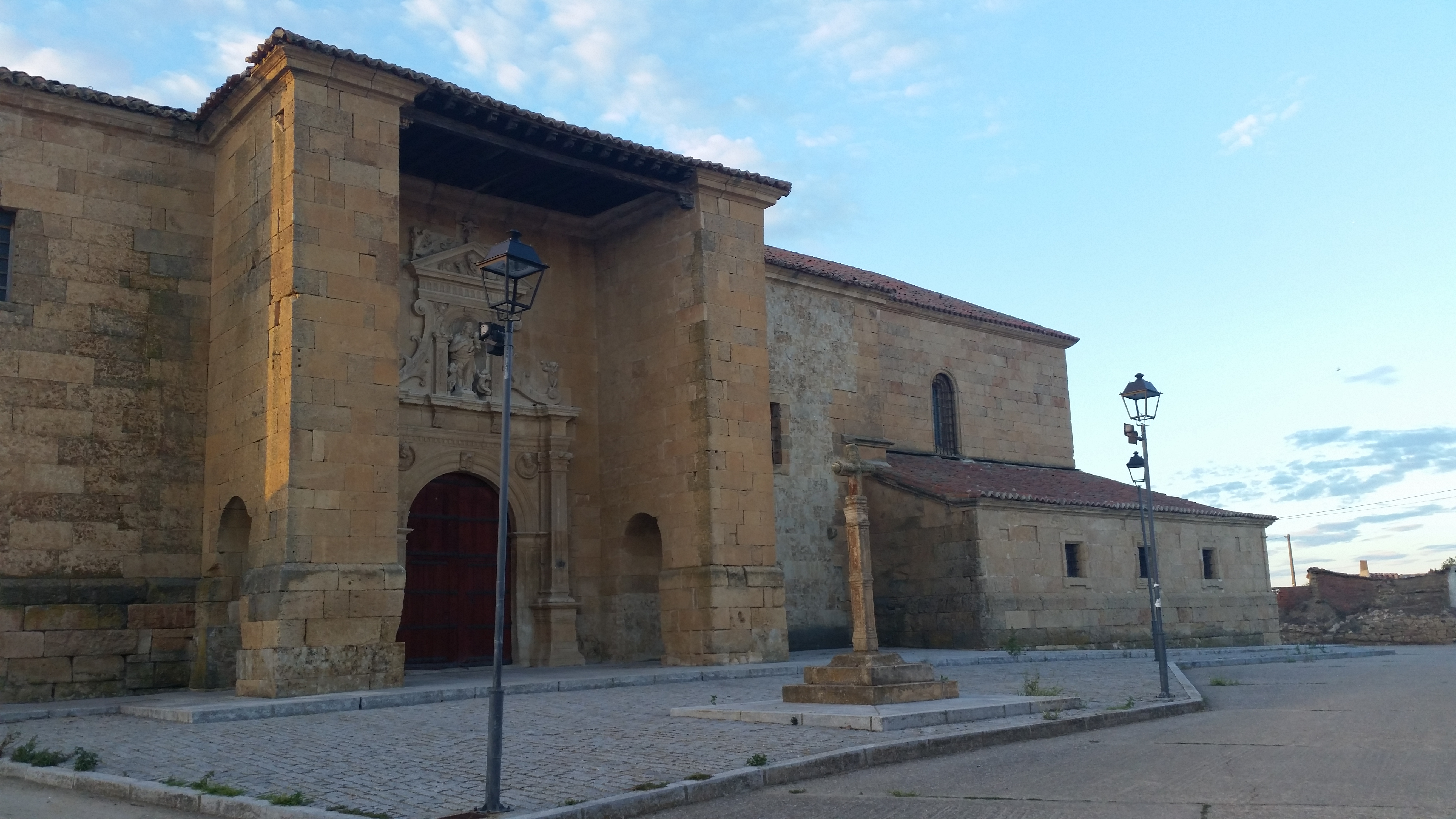 Imagen de la Iglesia Parroquial de San Cornelio y San Cipriano en Villaverde de Guareña, Salamanca.